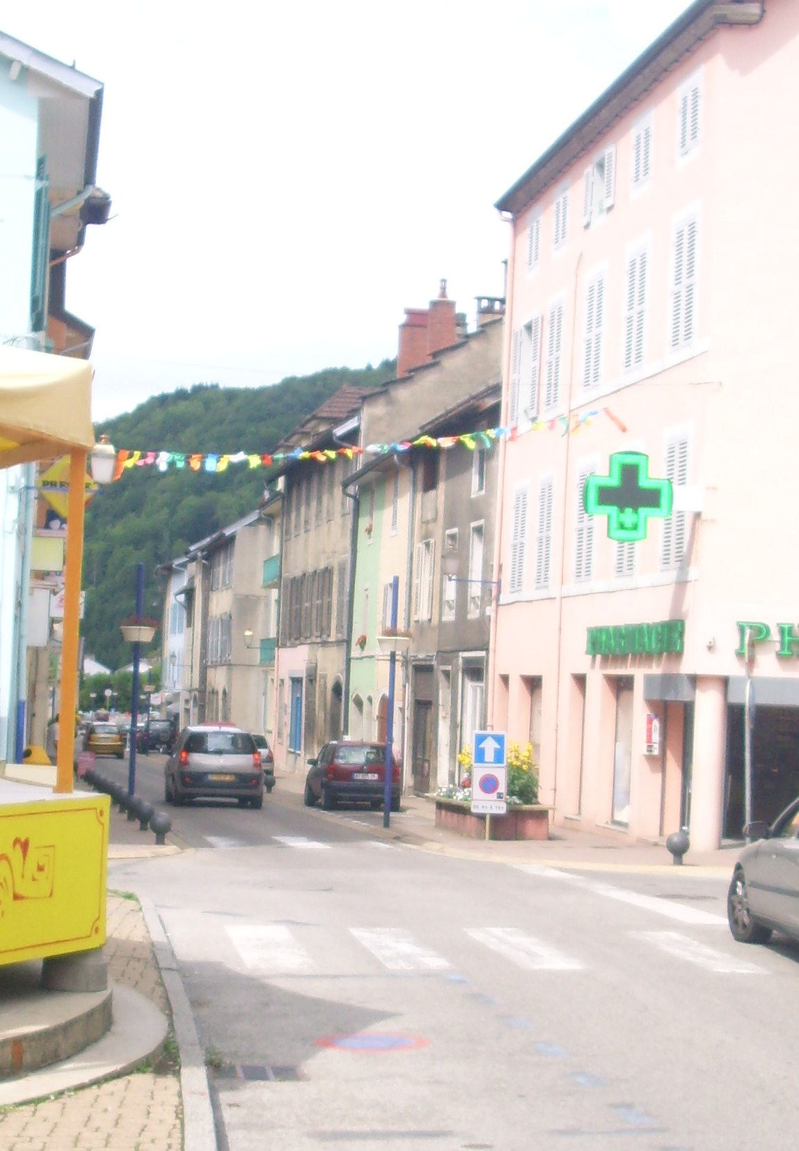 Une des rues de Moirans-en-Montagne (39)